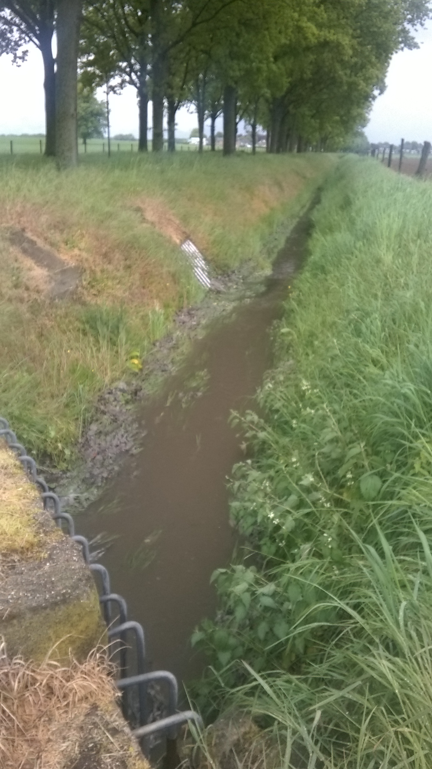 De beek Slond stroomt na een hevige regenbui van Einighausen naar Limbricht. Links tussen de bomen loopt het Slondpad. Helemaal op de achtergrond de bebouwing van de Vosdaalstraat in Limbricht.